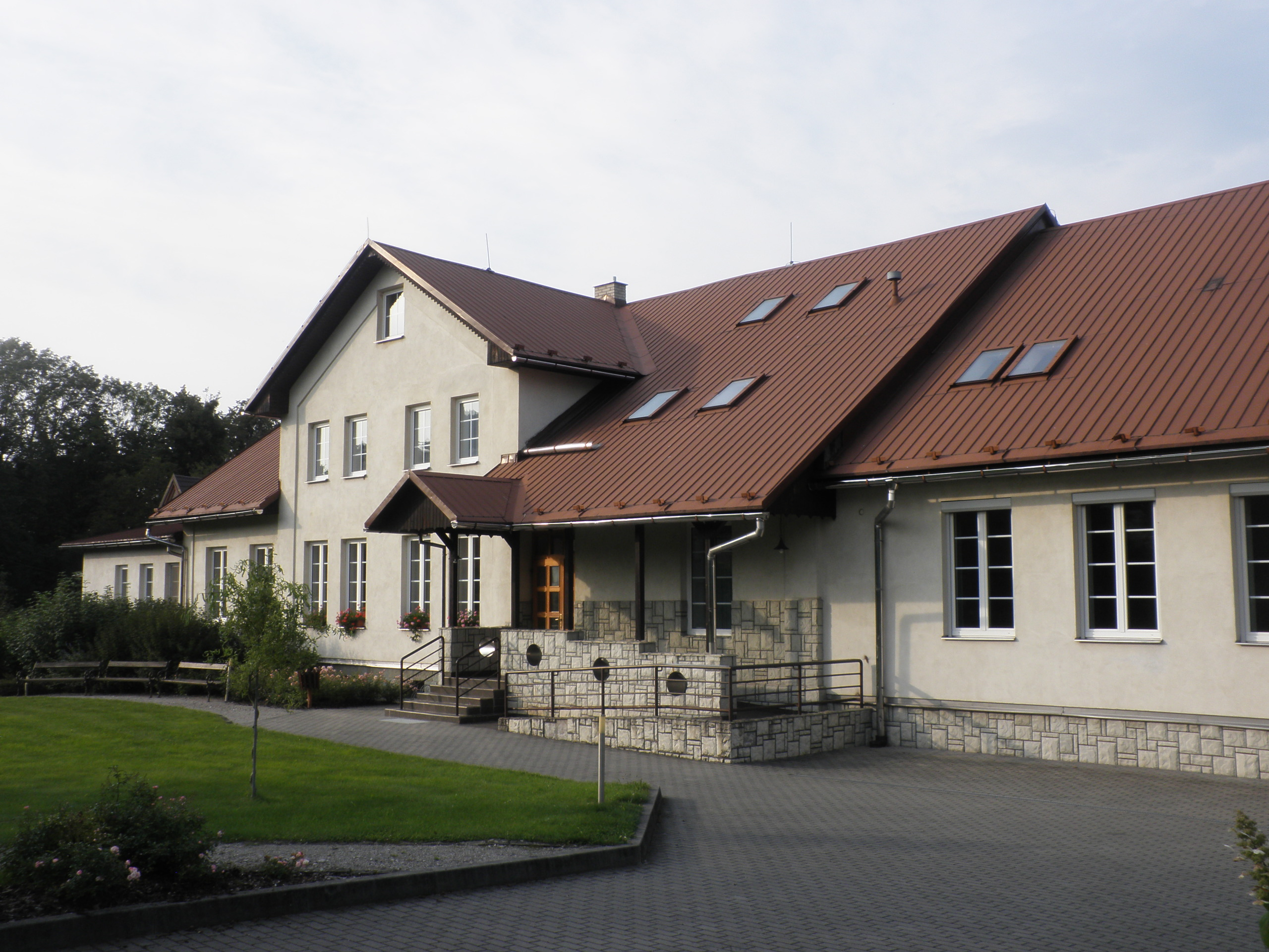 Karmel - duchovní a školící středisko Křesťanského společenství, z. s., ve Smilovicích, okr. Frýdek-Místek